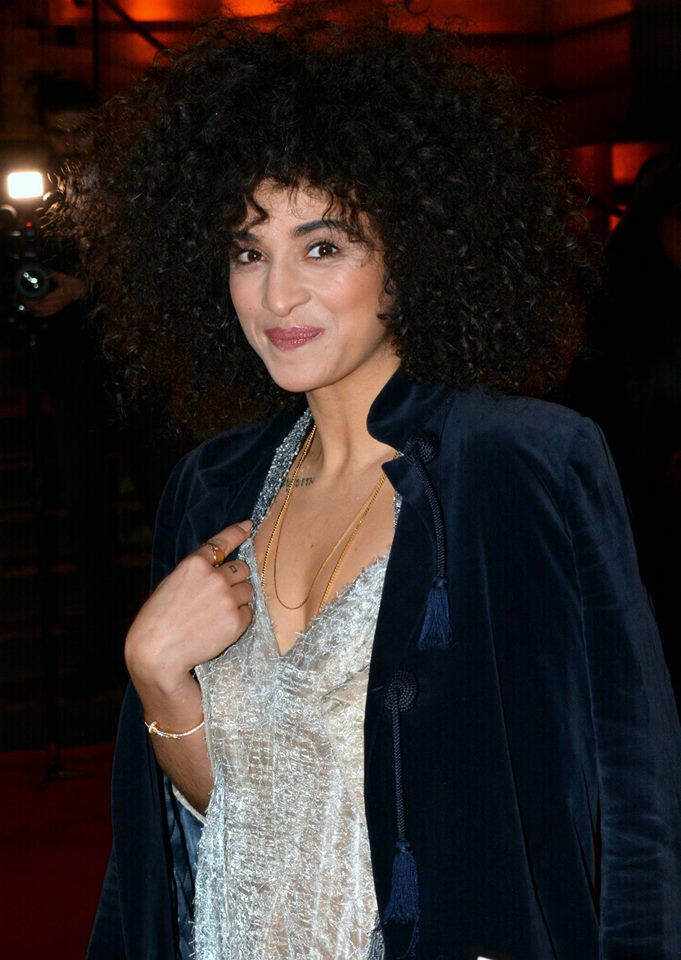 Camelia Jordana au dîner des révélations des César du cinéma